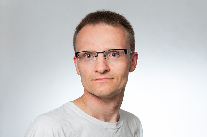 Arno Mikkor